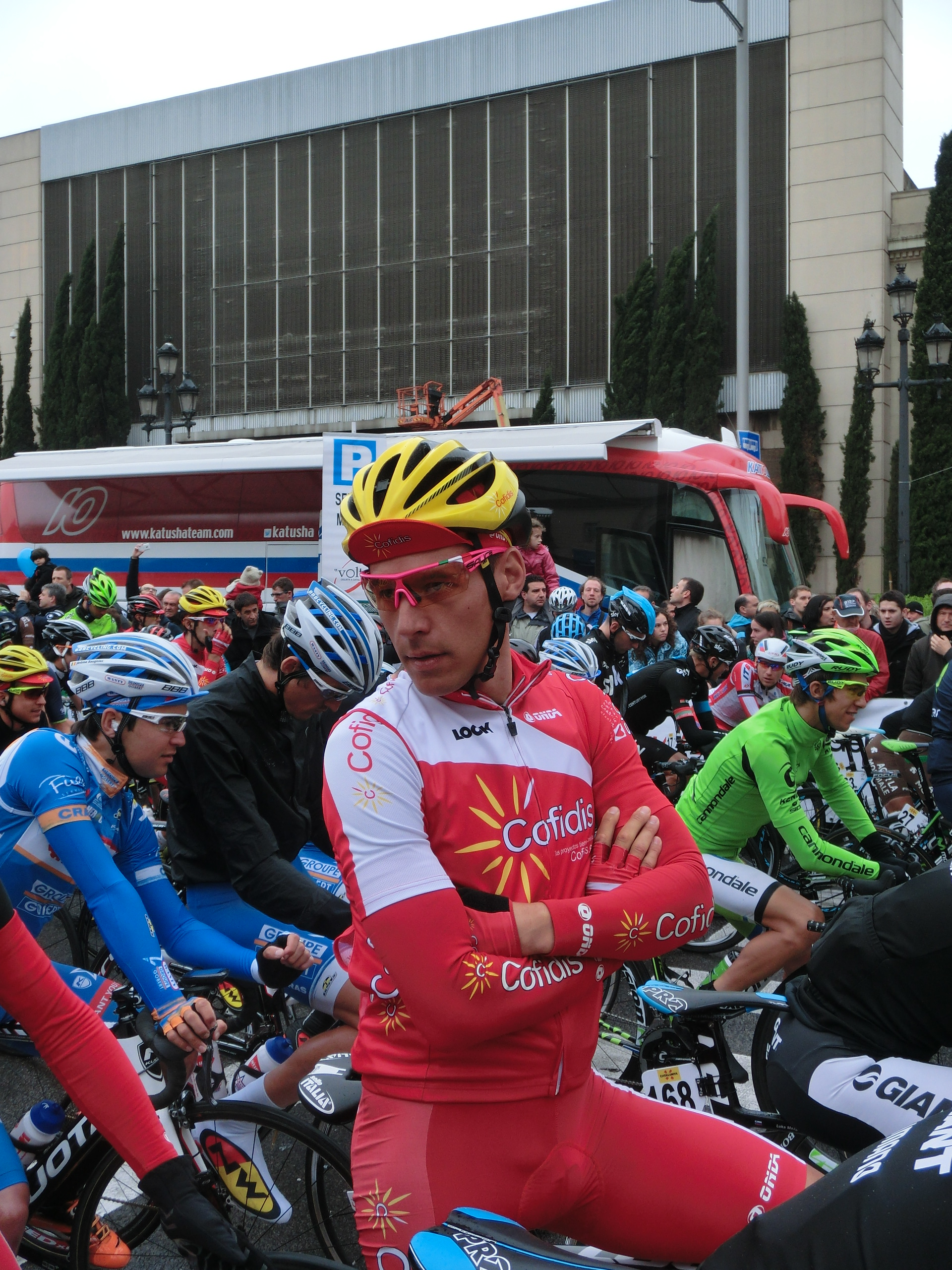 El corredor a la sortida de la 8a etapa de la Volta Ciclista a Catalunya 2014 a Barcelona.